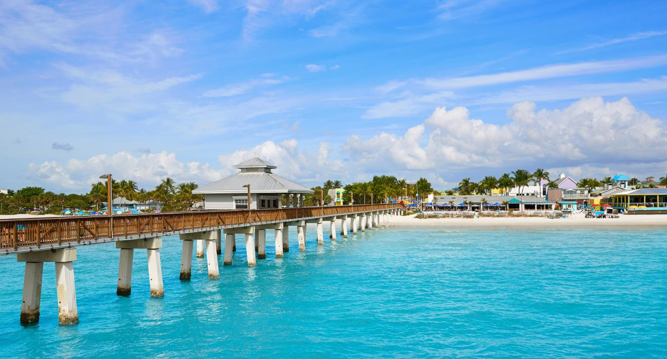 beach from pier